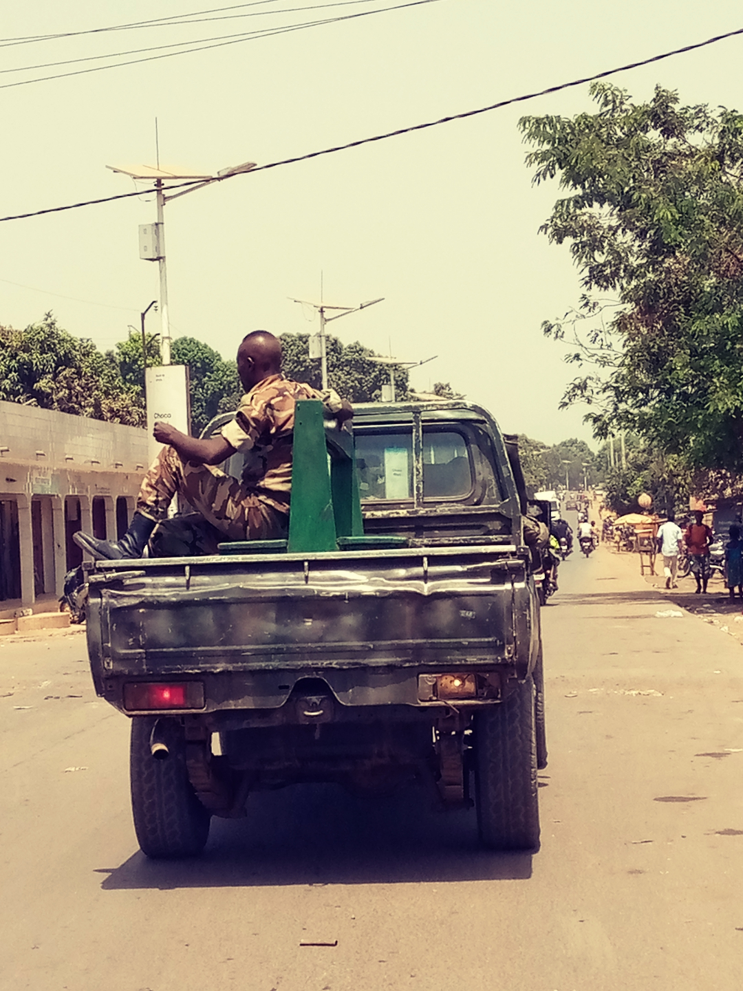 Direction pour le Camp This is an image with the theme "Africa on the Move or Transport" from: Guinea